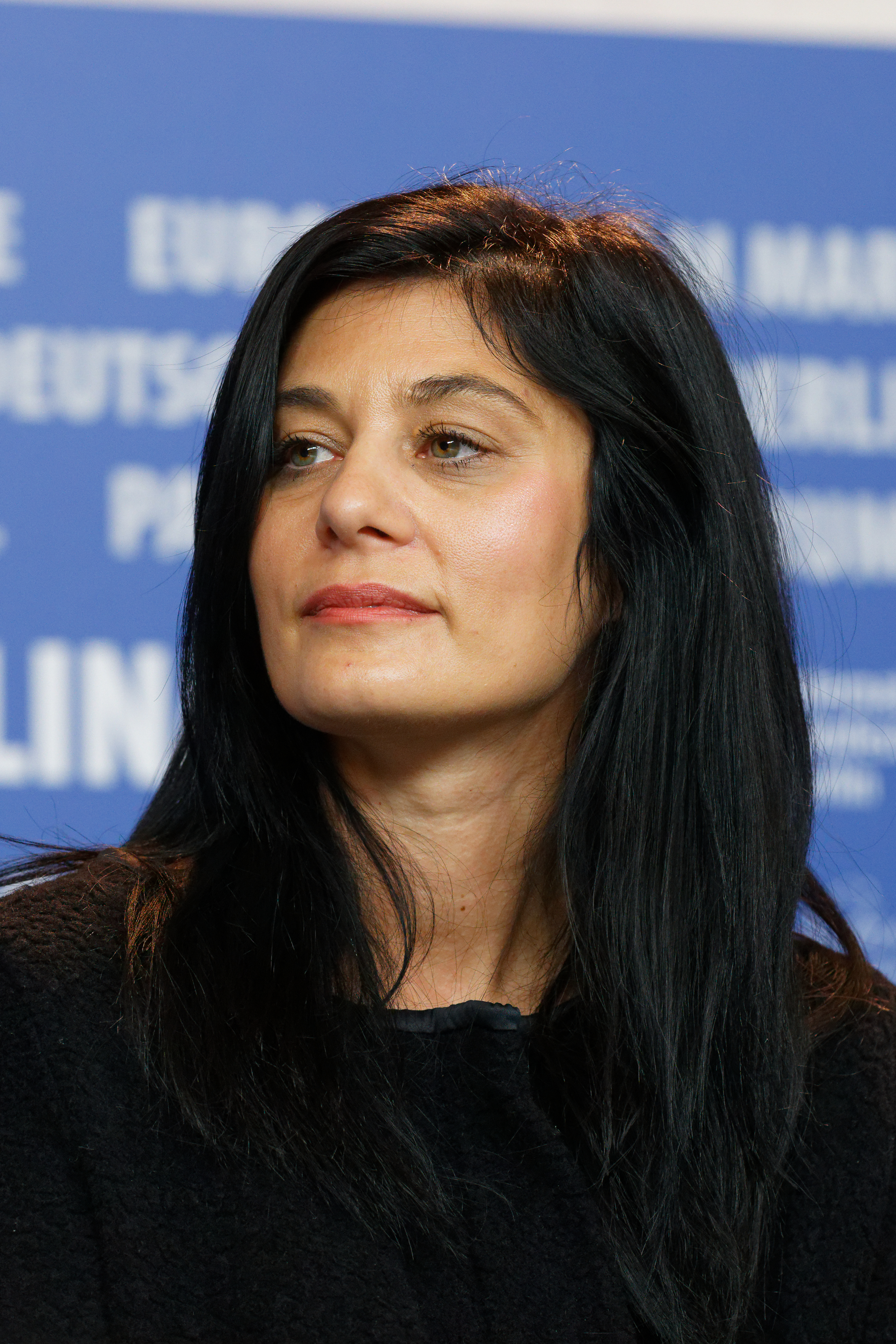 Labina Mitevska bei der Pressekonferenz zu When the Day Had no Name bei der Berlinale 2017